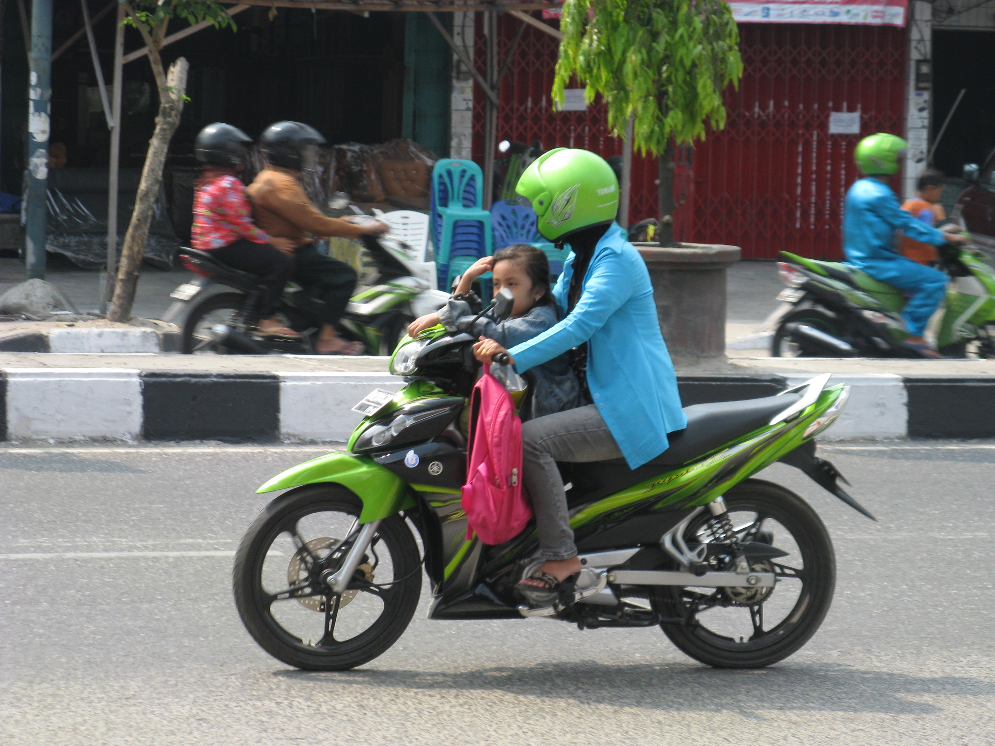 Seorang anak yang tidak menggenakan helm pada saat naik sepeda motor.